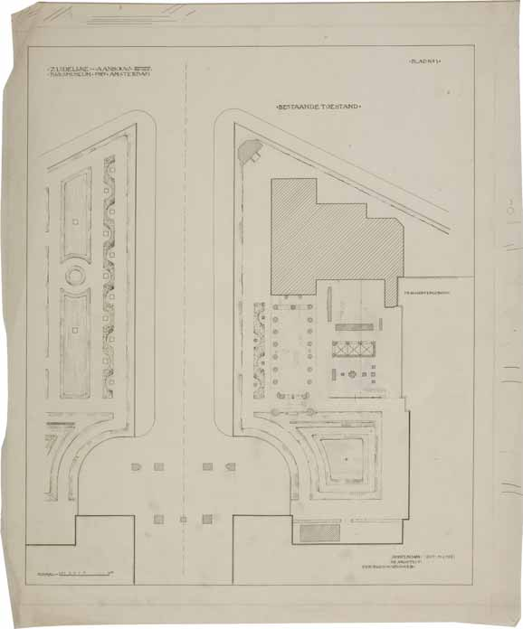 Bestaande Toestand. Plattegrond van zuidelijke museumtuin ten westen van de Museumstraat met de eerste Druckeruitbouw en de bouwfragmenten van de Nieuwezijds Kapel, de Amsterdamse Regulierswaag, de Middelburgse abdij, de Utrechtse Minder- broederskerk, het Amsterdamse Oude- zijds Herenlogement en het hek van Huize de Voorst te Warns- veld, 2 oktober 1911. Nederlands Architec- tuurinstituut, Rotter- dam (Ryks t2277).